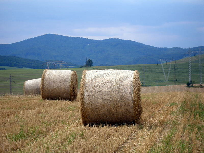 Chotár v obci Sedlice. Na tofli po žatve v roku 2007.Región Šariš, okr.Prešov.